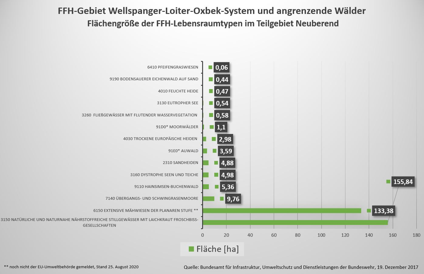 LRT-Flächen im TG-Neuberend + LRT 6150